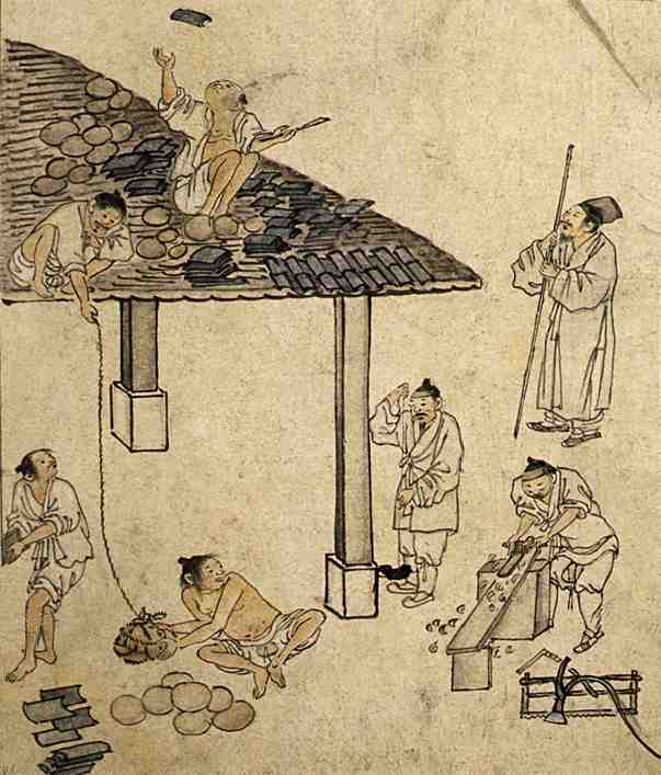 기와이기(葺瓦), 단원풍속도첩(檀園風俗畵帖)에서 종이에담채, 27cm x 22.7cm, 국립 중앙박물관 소장